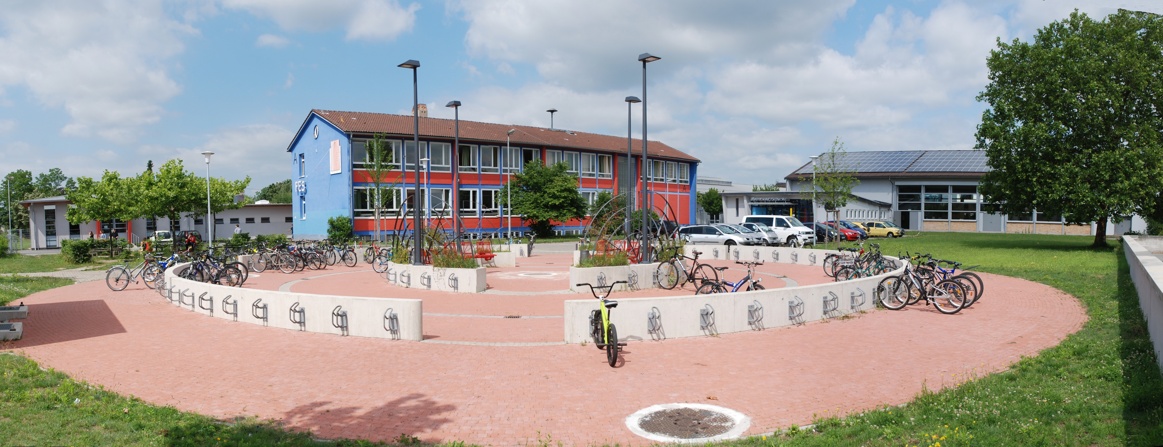 FES Pfungstadt von Süden. Ganz links im Bild die Kantine, ganz rechts im Bild die Sport- und Kulturhalle. Unter dem Fahrradabstellplatz wurde 2008 ein Regenrückhaltebecken gebaut.